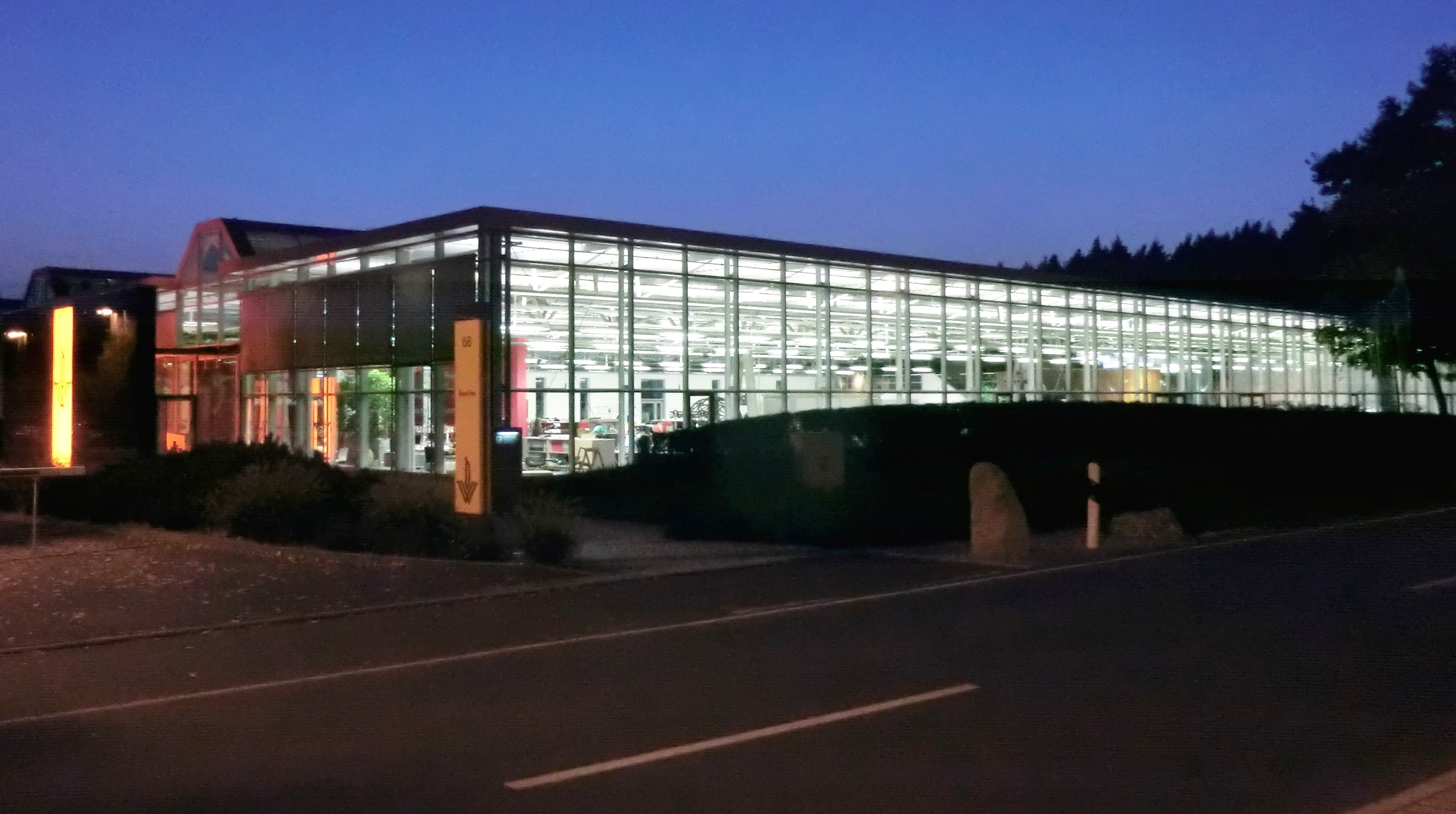 Neubau Gebäude der Deutsche Werkstätten Hellerau am Abend